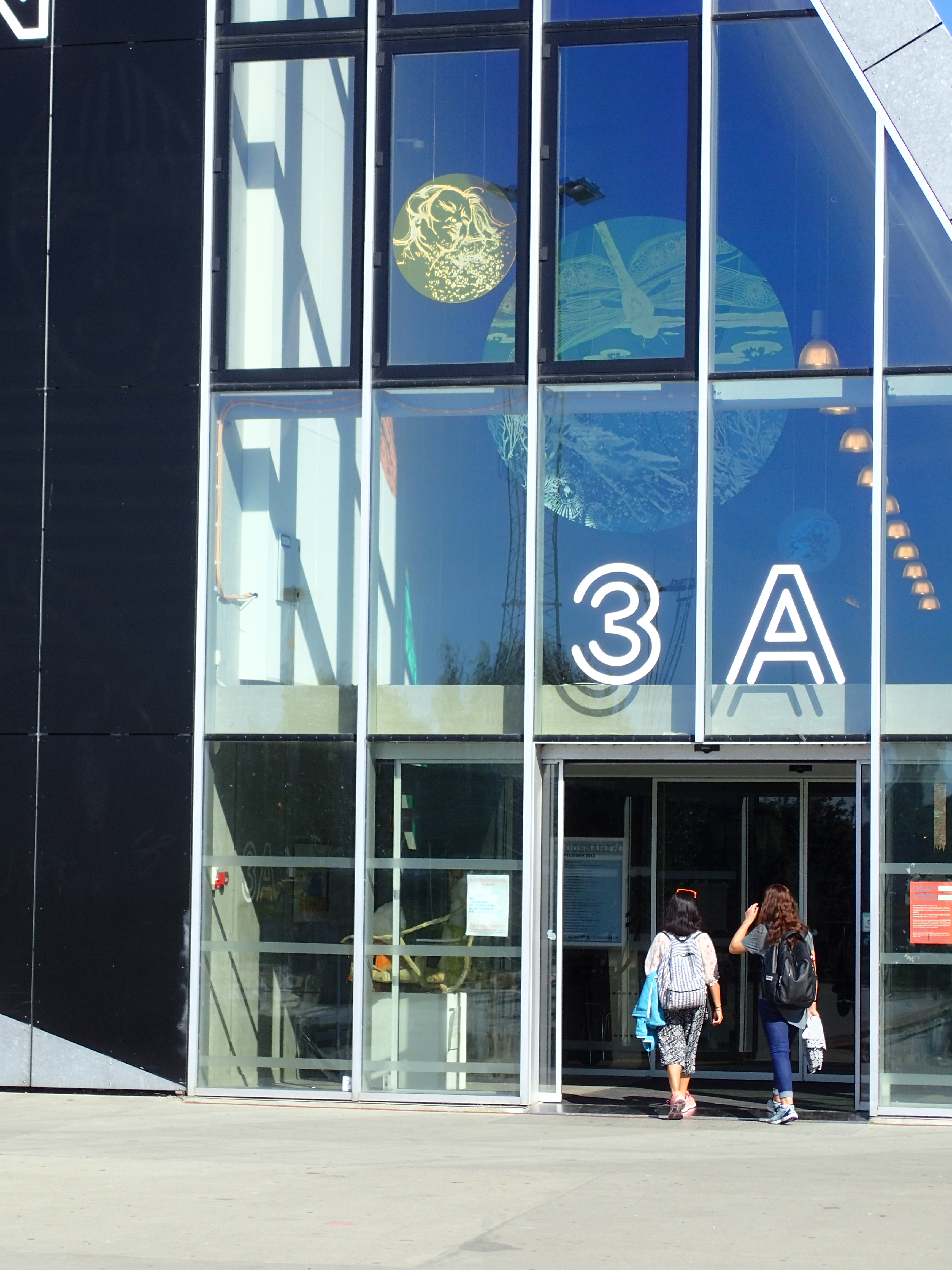 Indgang til kulturcenteret Godsbanen i Aarhus.